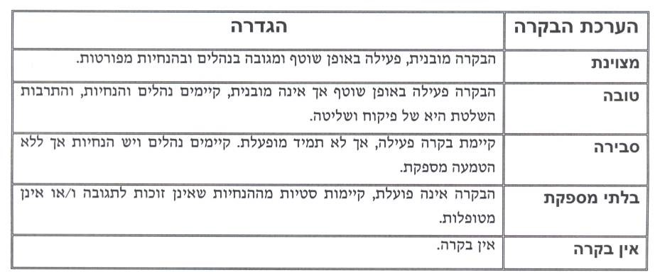 הערכה איכותנית של אפקטיביות הבקרה